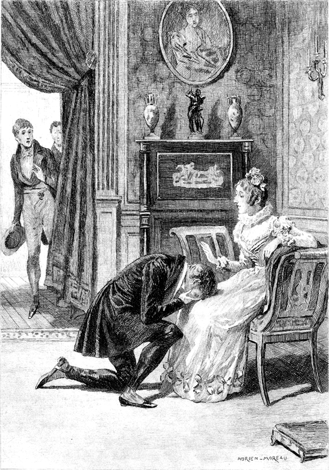 Title page of Honoré de Balzac's Lost Illusions, Mme de Bargeton's Boudoir (1837).